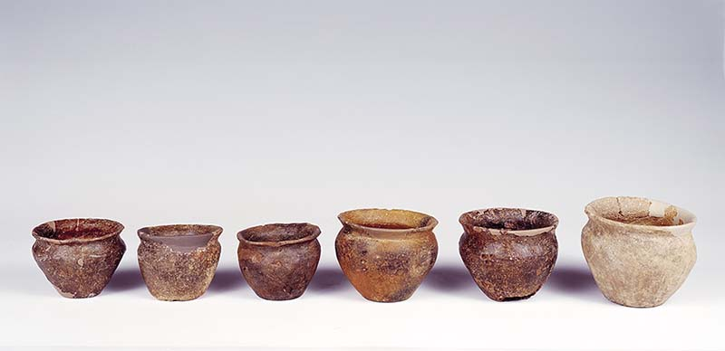 Materials col·lecció